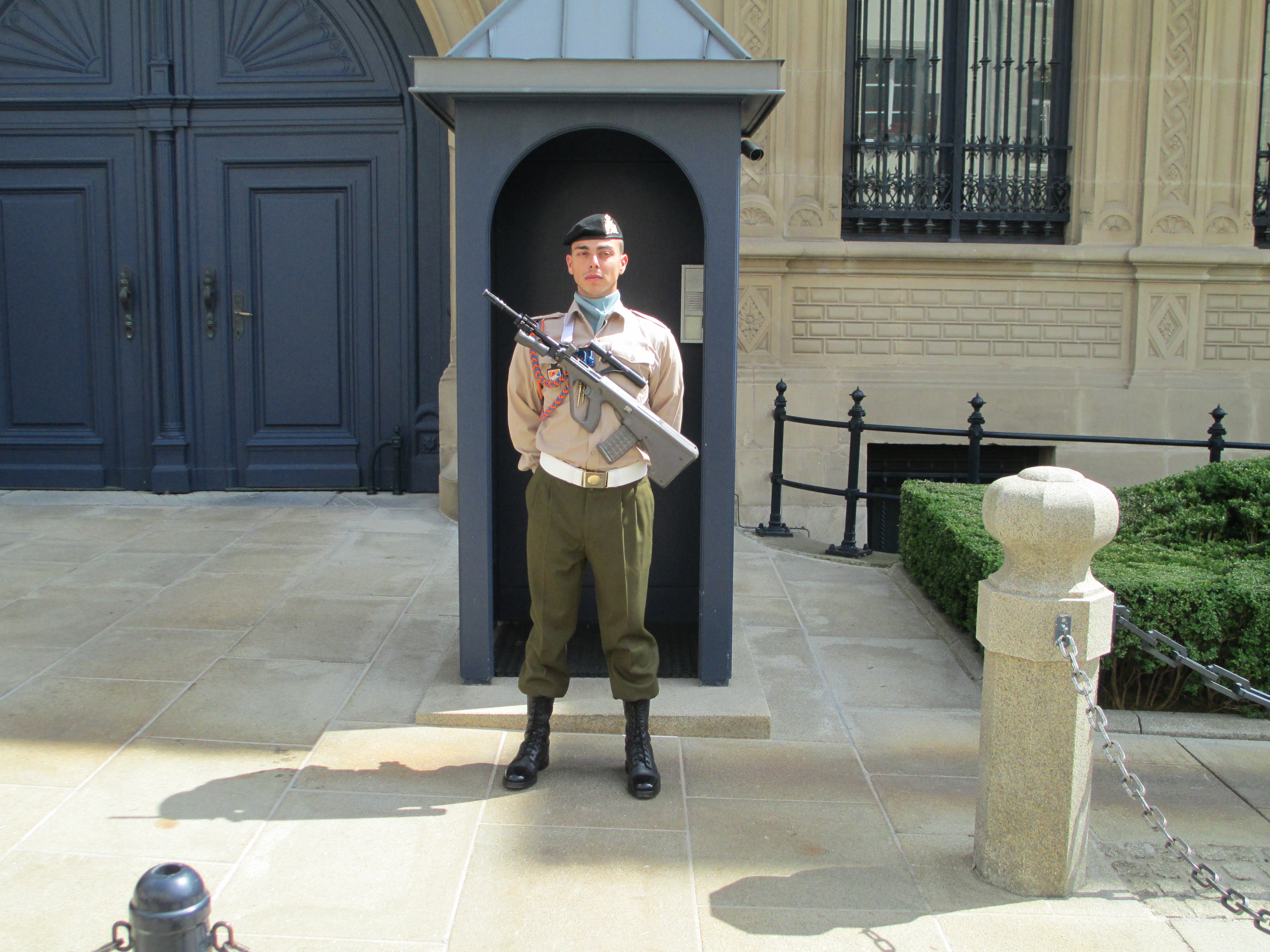 שומר בכניסה לארמון הדוכס הגדול בלוקסמבורג